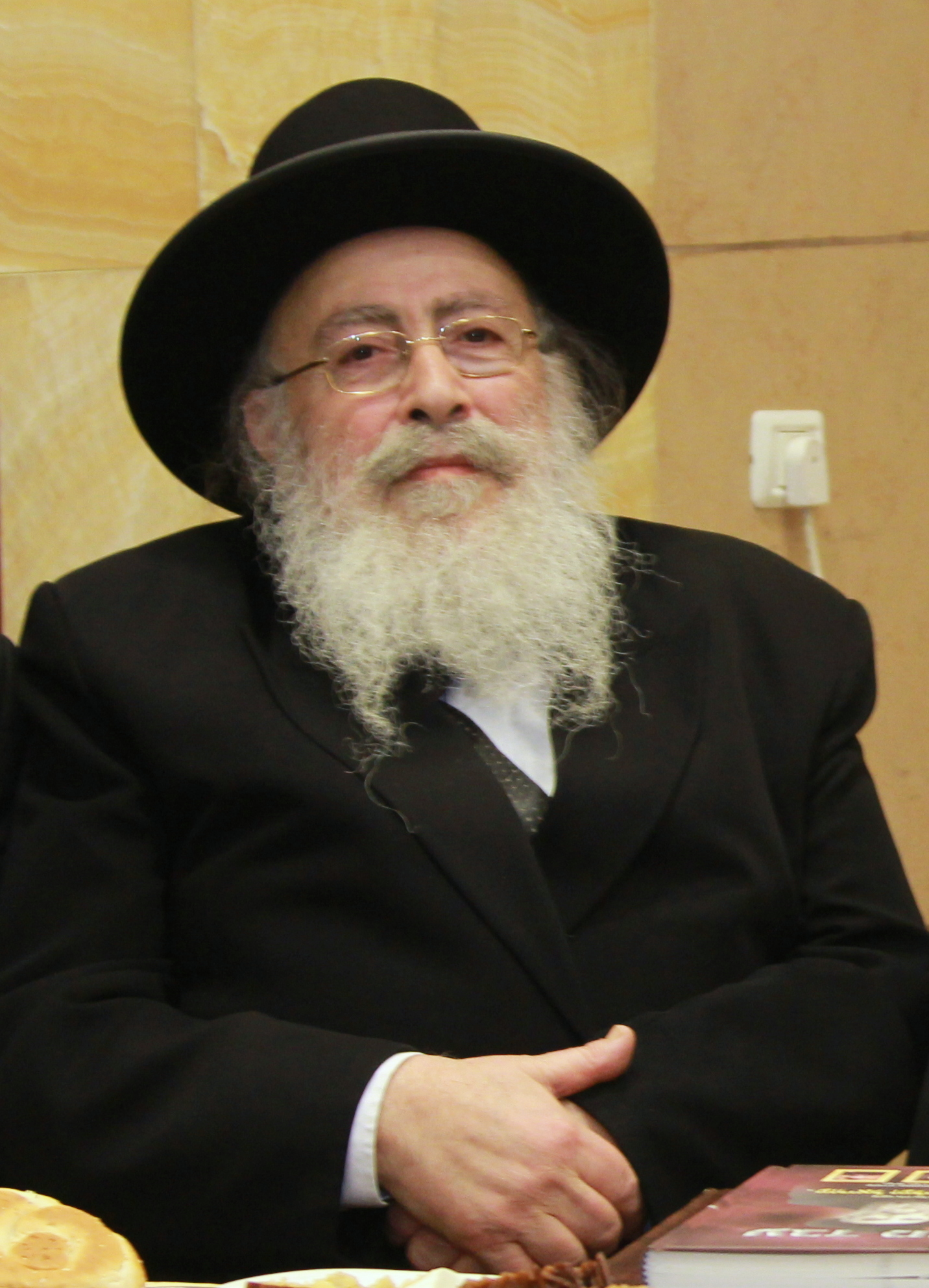 הרב שמעון אליטוב הוא רב המועצה האזורית מטה בנימין, חבר מועצת הרבנות הראשית